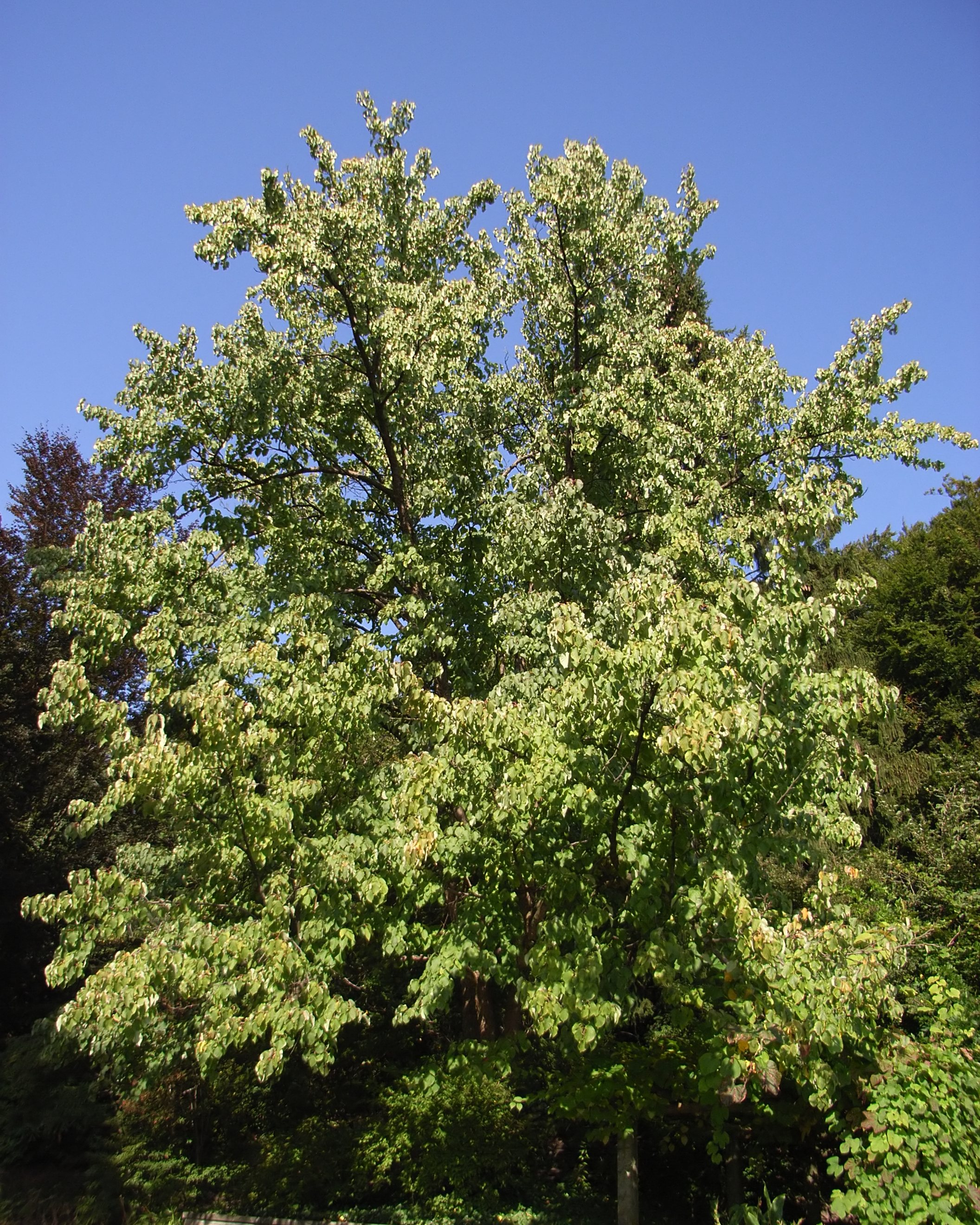 Davidia involucrata